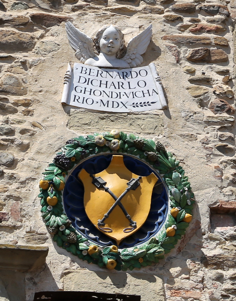 Palazzo dei Vicari This is a photo of a monument which is part of cultural heritage of Italy.